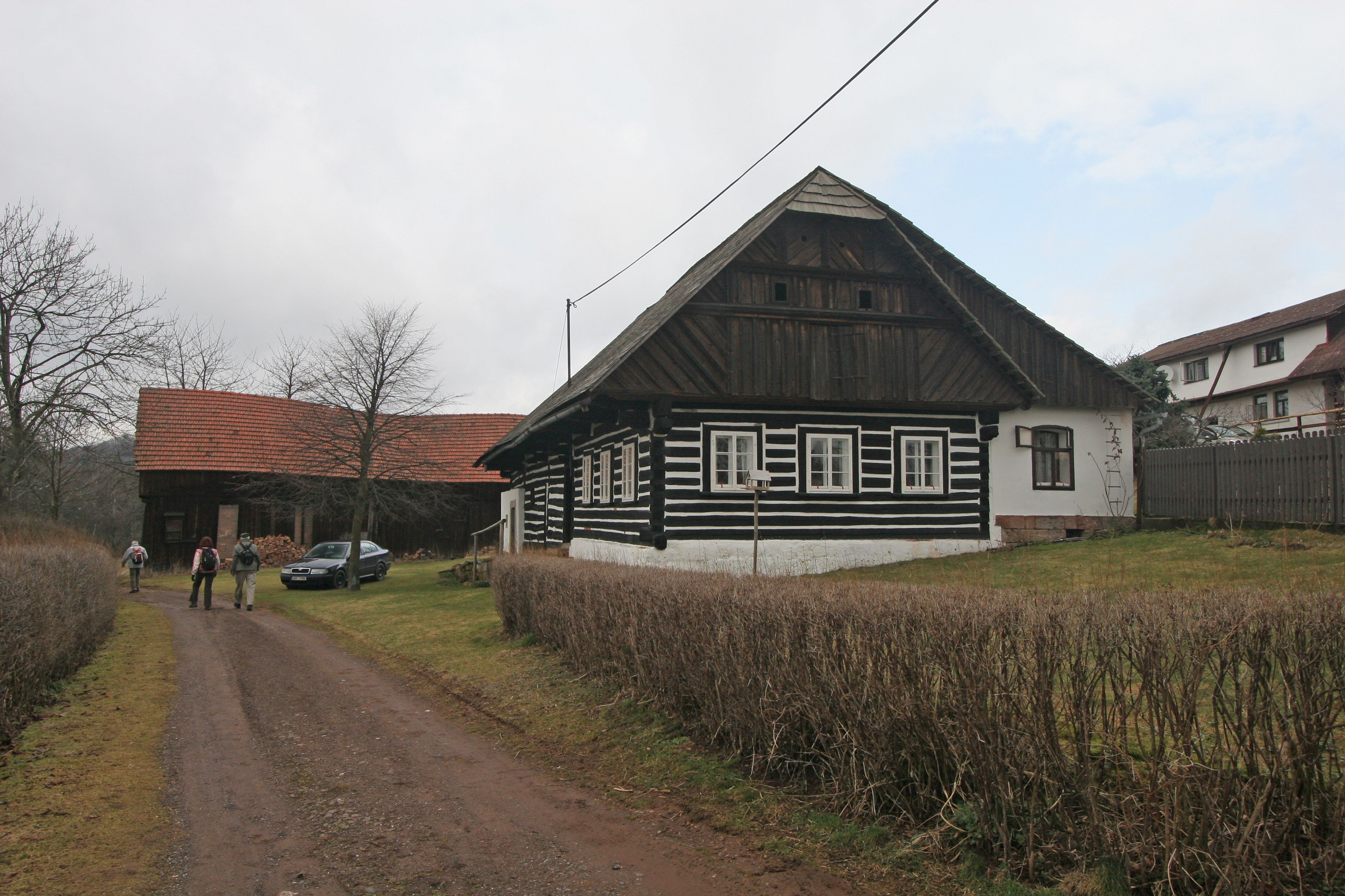 Brdo čp. 42